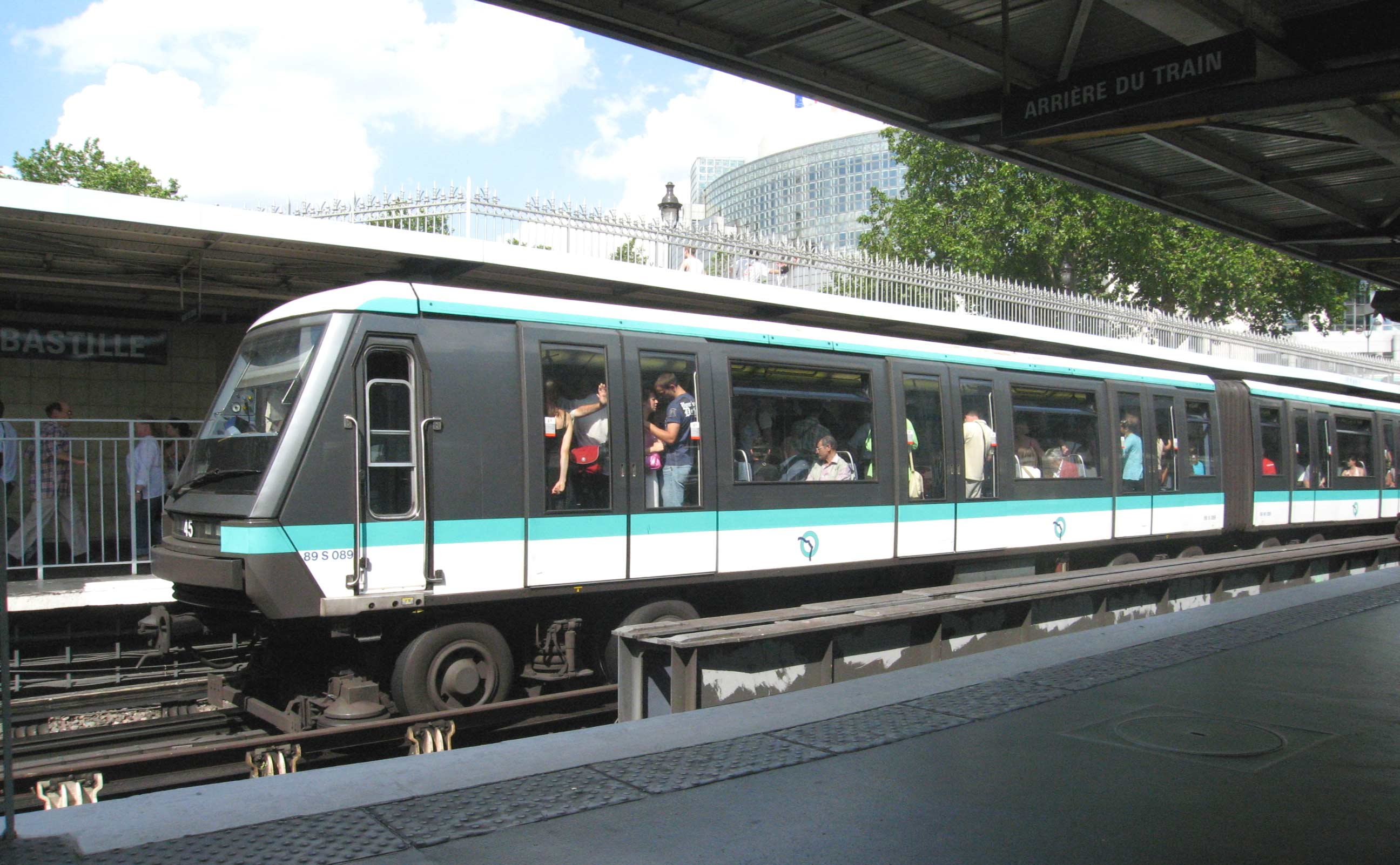 Metro de Paris Rame de type MP89 sur la ligne 1 à la station Bastille Lieu : Paris, France Date : Juin 2006 Auteur : Pline photo personnelle